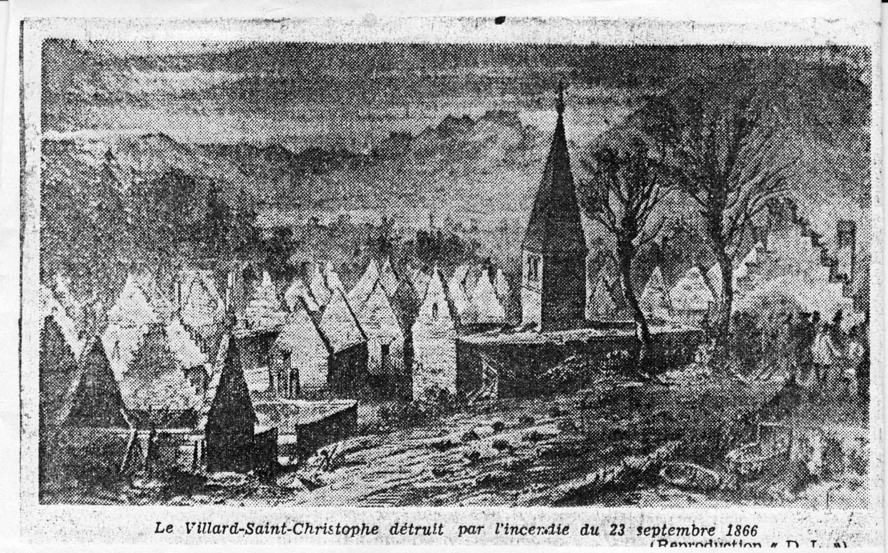 Photographie de Villard Saint Christophe après l'incendie du 23 septembre 1866.